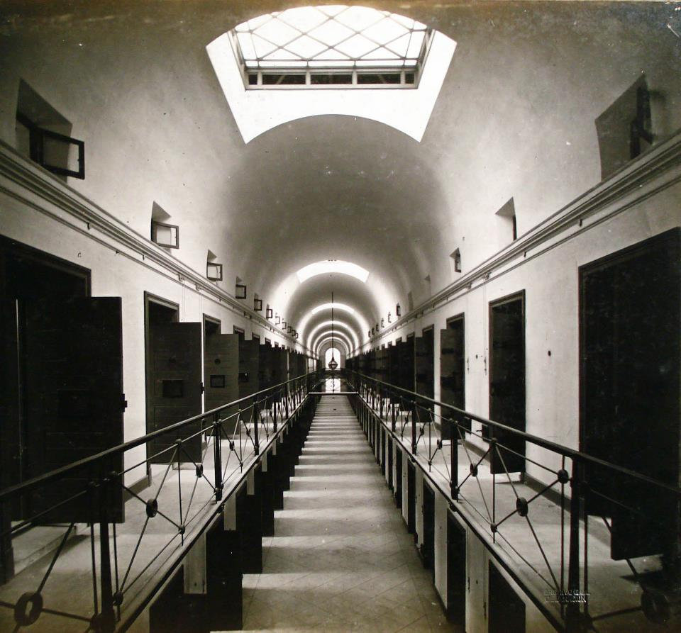 Un pabellón de la antigua Penitenciaría Nacional Argentina que funcionó en Palermo, Buenos Aires hasta 1962. Construida en 1876, hoy su terreno es el Parque Las Heras.